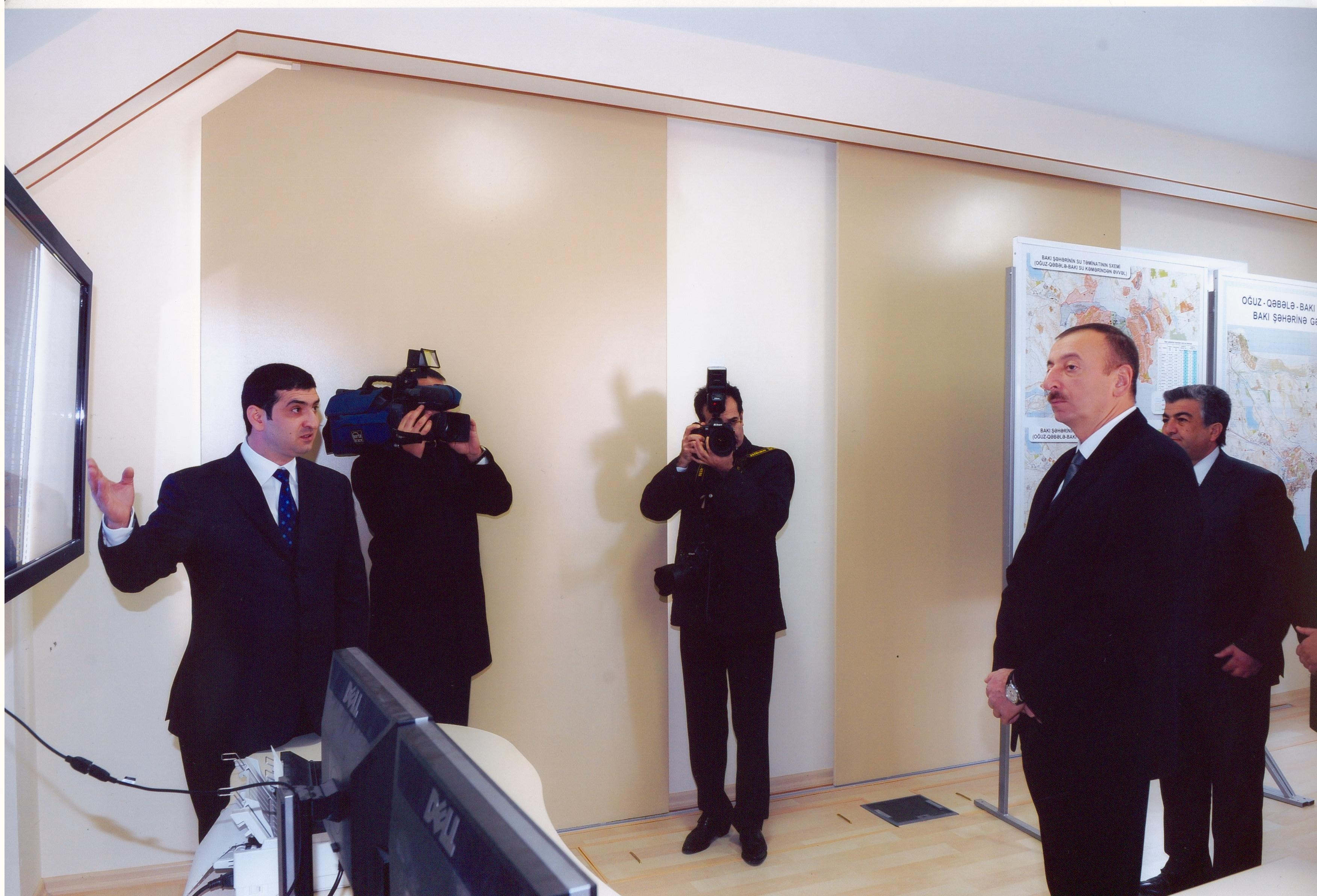 Президент Азербайджана Ильхам Алиев принял участие в открытии водопровода Огуз-Габала-Баку